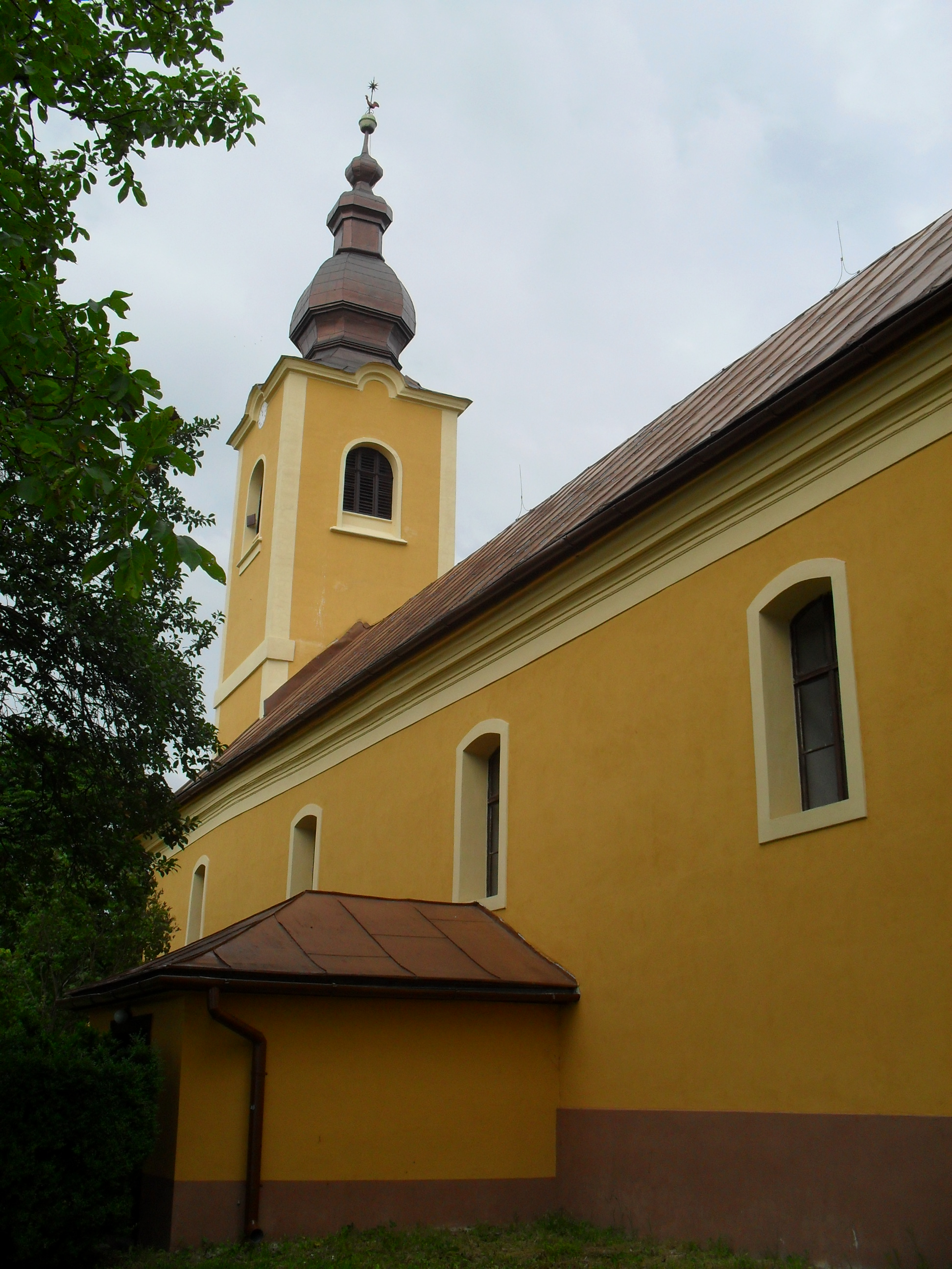 Nagybalog - református templom